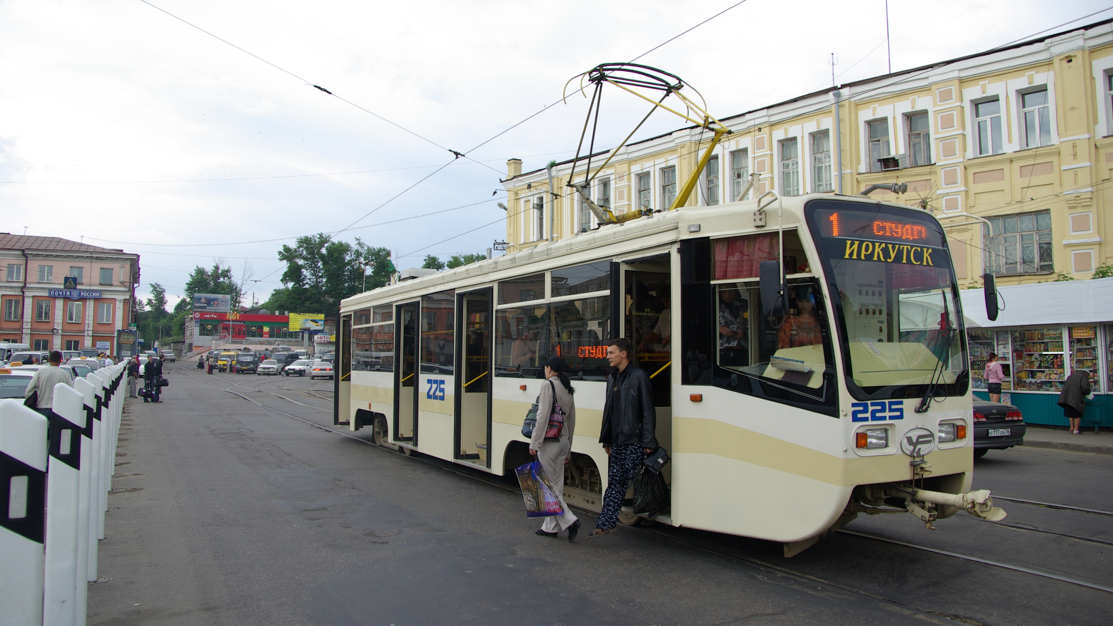 Иркутский трамвай